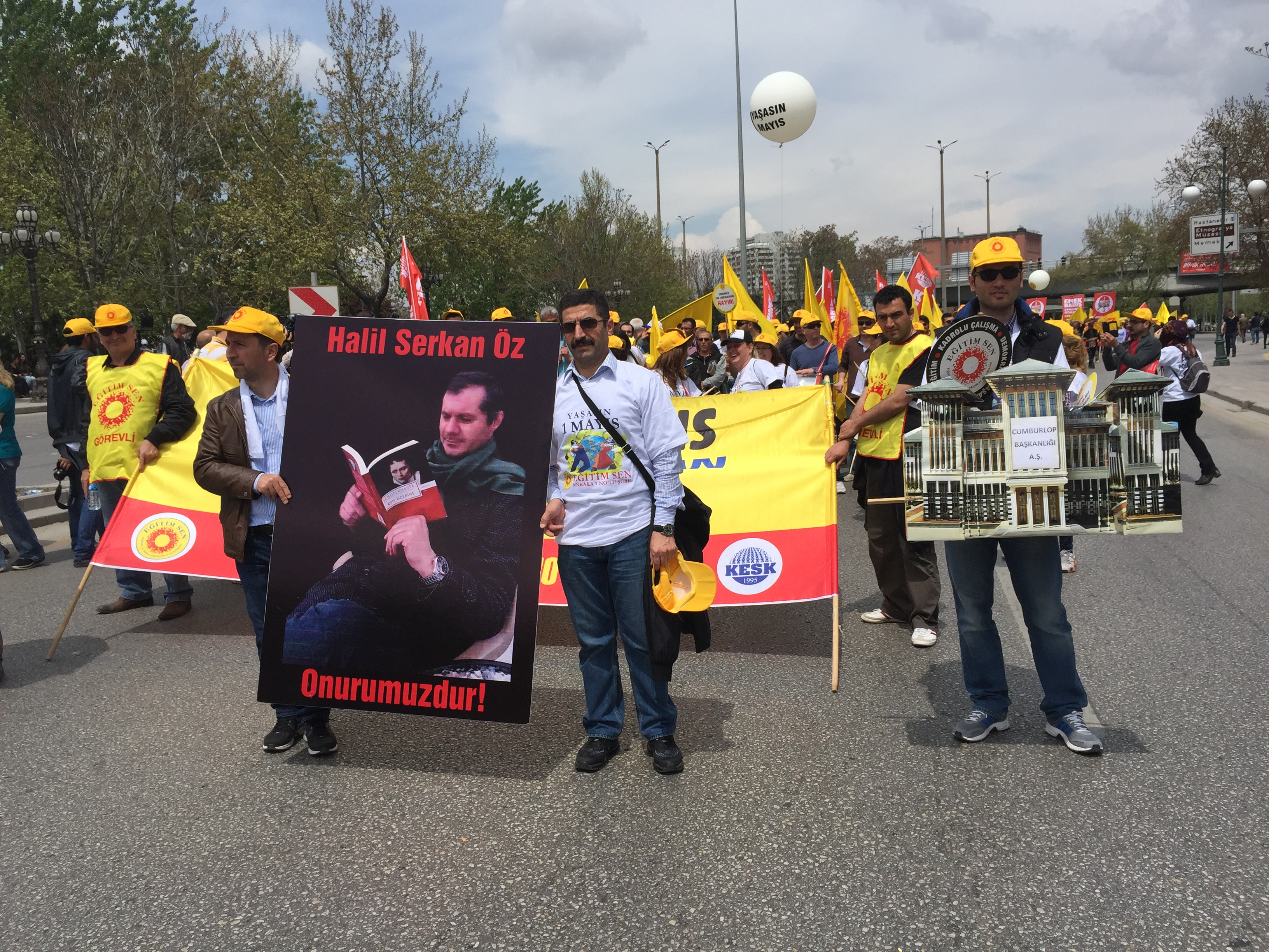 1 May 2015 demonstration in Turkey